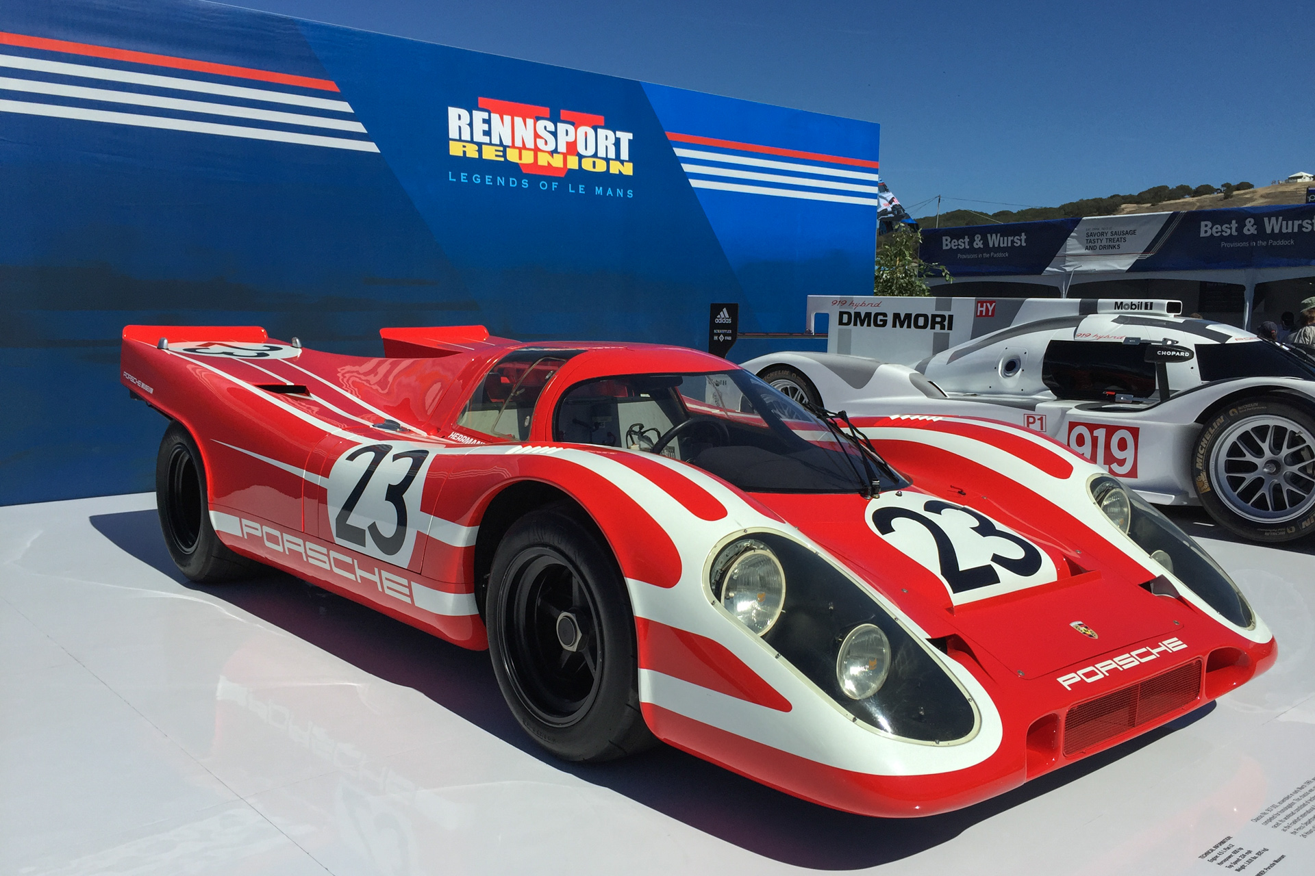 Rennsport Reunion V